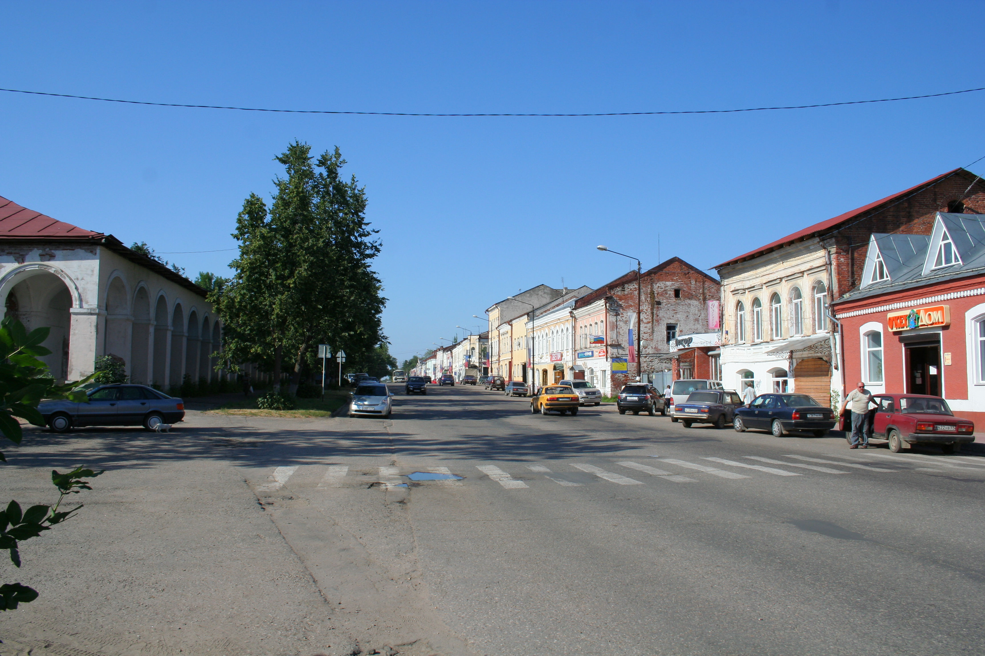 Ansichten der Stadt Wyschni Wolotschok (Oblast Twer, Russland). Stadtzentrum, Kasaner Prospekt.